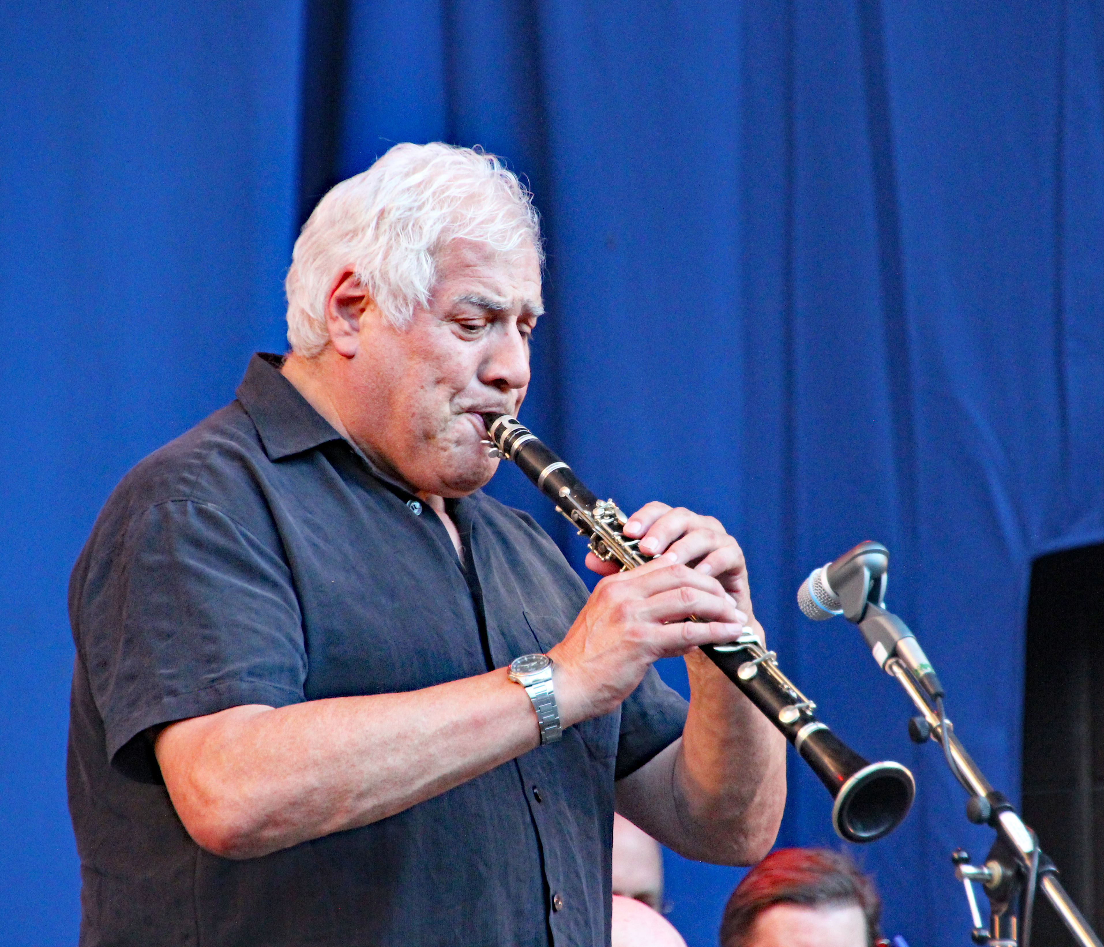 Bildinhalt: Wilson de Oliveira mit Klarinette bei einem Auftritt der Frankfurt Jazz Big-Band im Frankfurter Palmengarten Aufnahmeort: Frankfurt am Main, Deutschland Die dargestellte Person ist eine Person bei einem öffentlichen Auftritt.